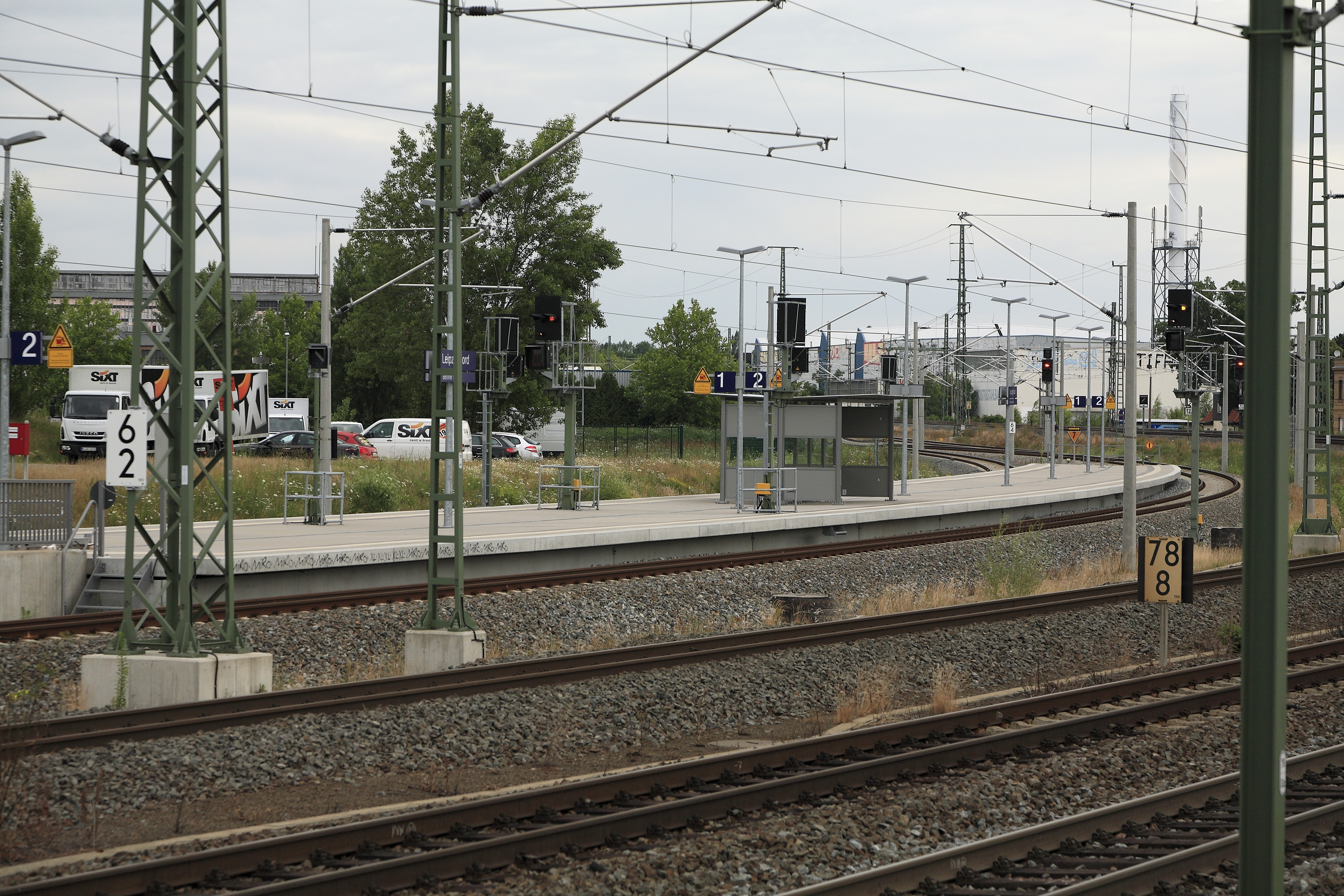 Geplant als Hp Theresienstraße, schon länger fertiggestellt und trotzdem bis zur Inbetriebnahme der Stadttunnels im Dezember ungenutzt. Das Interesse der Reisenden scheint für Besteller und Betreiber keine Rolle zu spielen. Die Gleise im Vordergrund gehören zur Strecke 5919 Eltersdorf–Leipzig